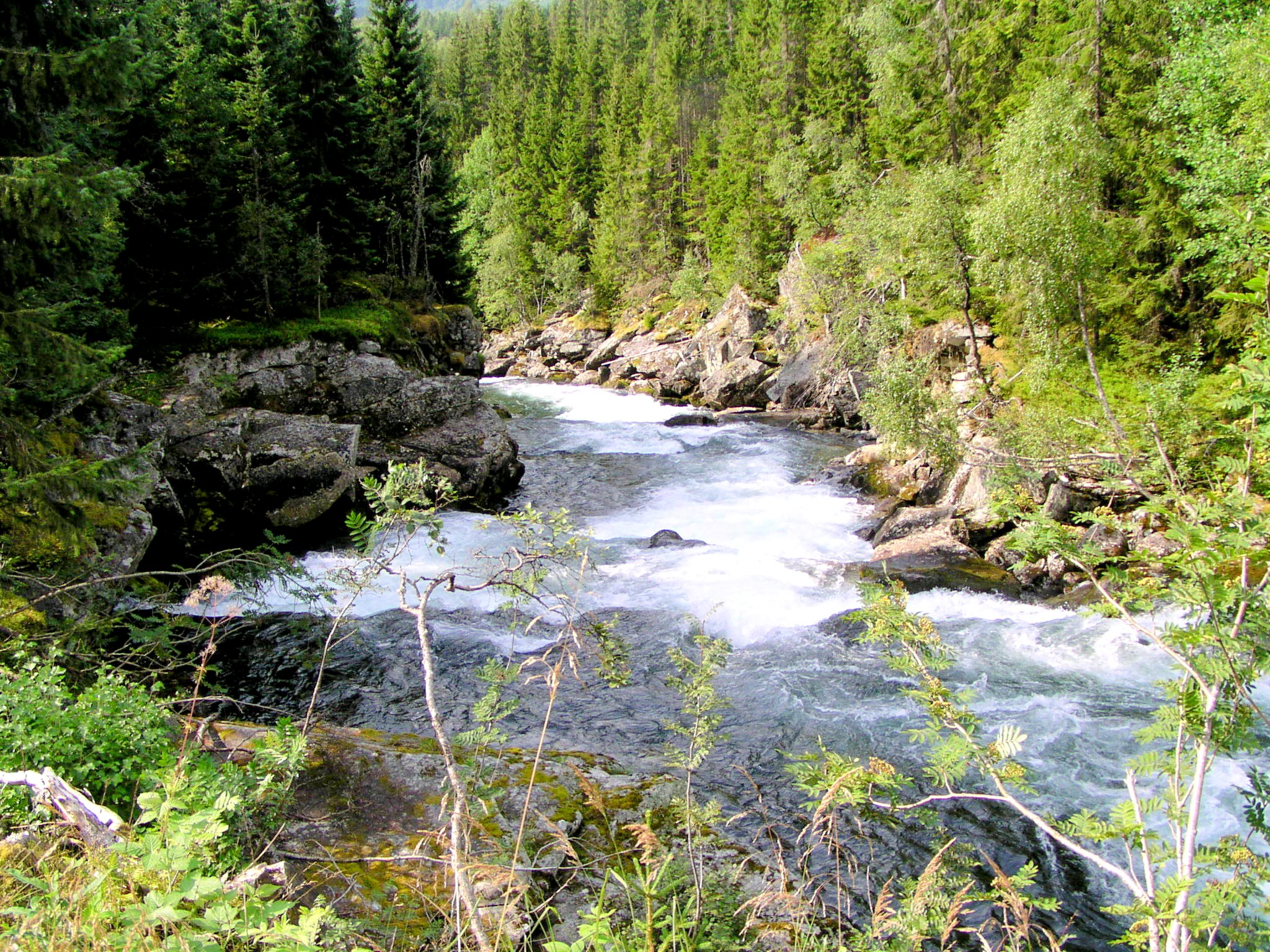 Sogndalselvi on its way from Dalavatnet to Sognefjorden.